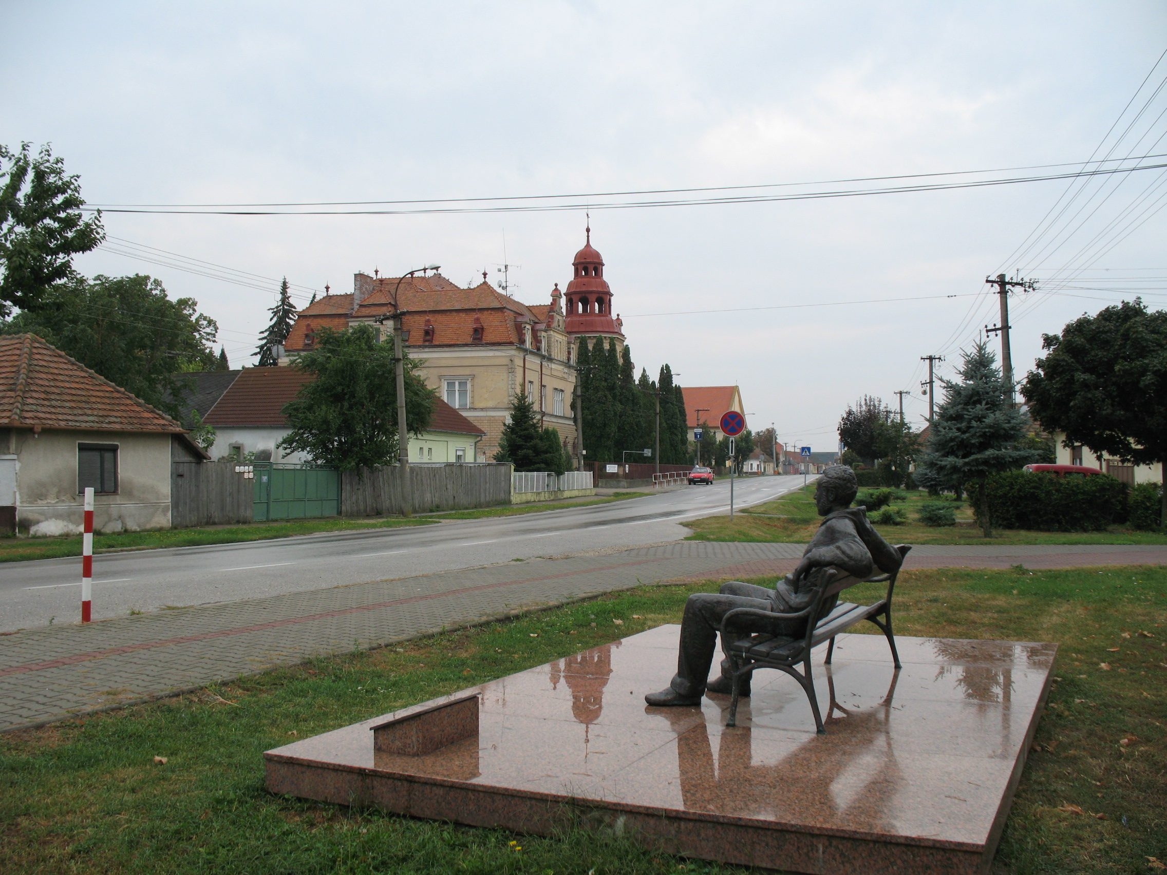 Diószeg